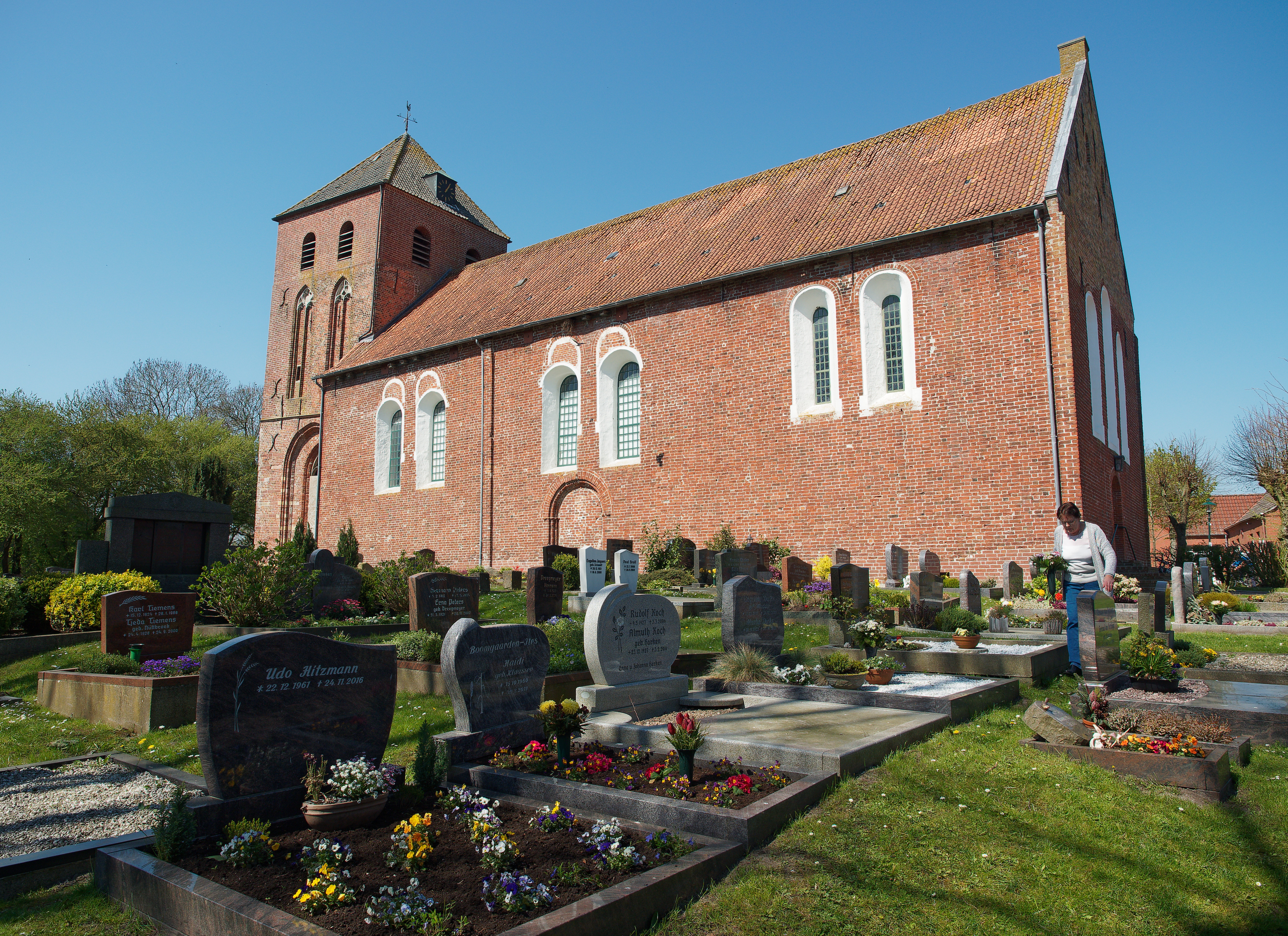 Die ev. reformierten Kirche in Uttum (Ostfriesland) aus dem Jahr 1250. Ansicht aus südlicher Richtung